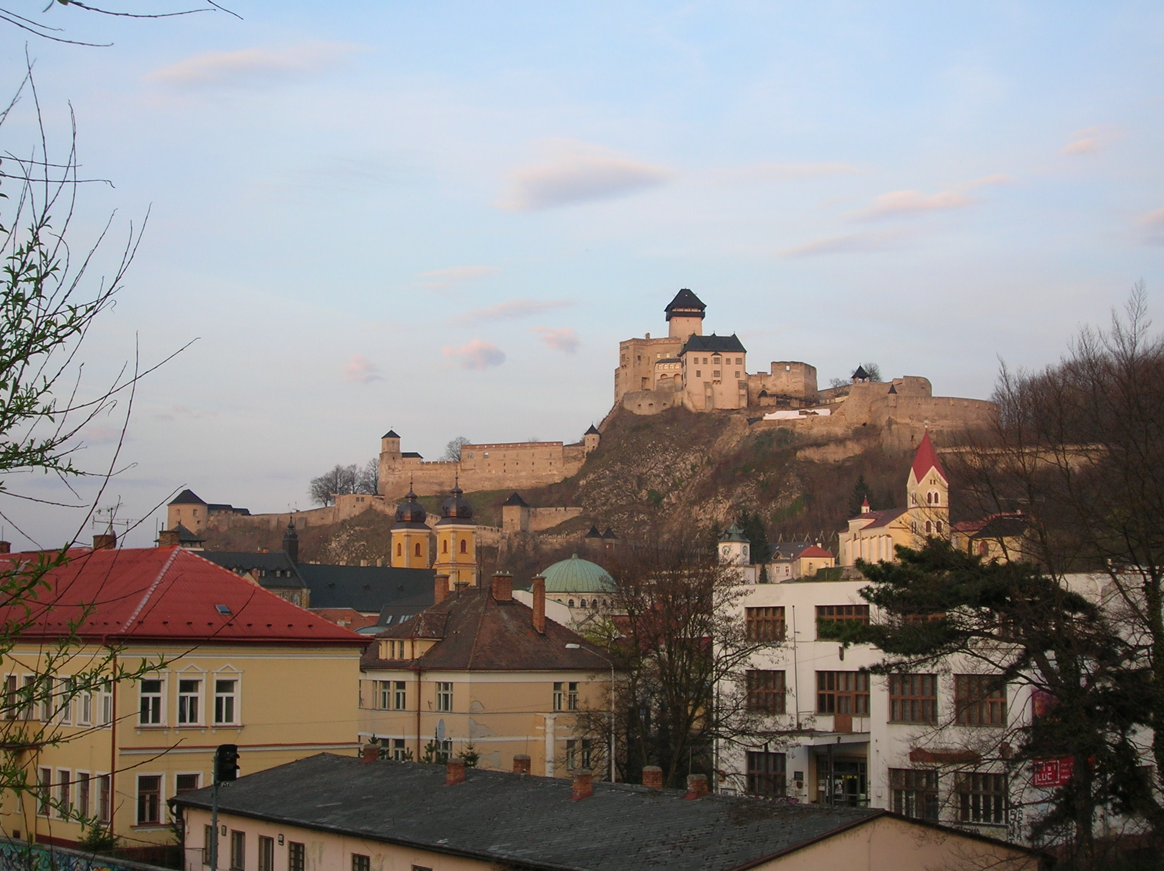 pamiatky mesta Trenčín: synagóga (zelená kopula), Piaristický kostol sv. Františka Xaverského (vľavo, dve veže), Dolná brána (mestská veža), Farský kostol Narodenia Panny Márie (vpravo vzadu, červená strecha veže), Trenčiansky hrad (v strede vzadu)